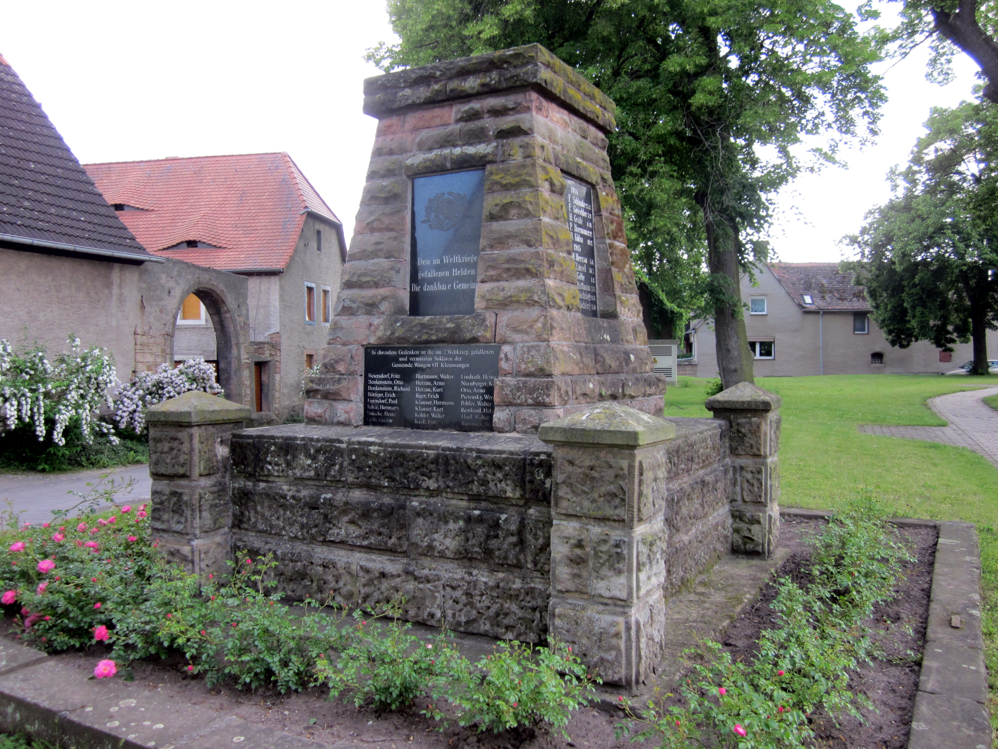 Kriegerdenkmal in Kleinwangen (Unstrut)